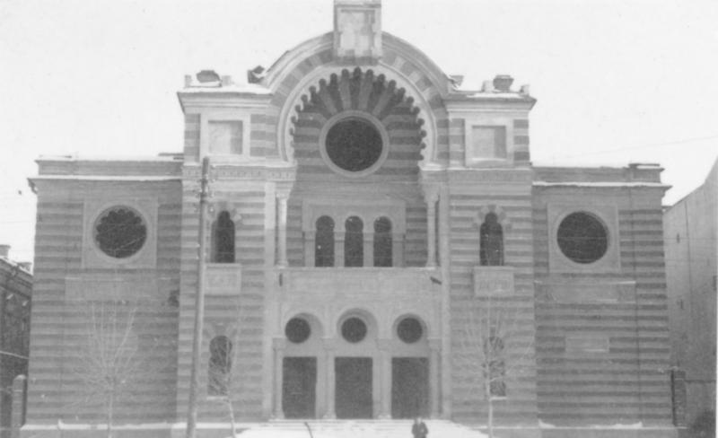 Minsk, 1. Dez. 1942 Jüdisches Staatstheater in Minsk (bis 1924 Hauptsynagoge) Einsatzstab Reichsleiter Rosenberg für die besetzten Gebiete - Hauptarbeitsgruppe Ostland Film: 49/14 Information added by Wikimedia users.